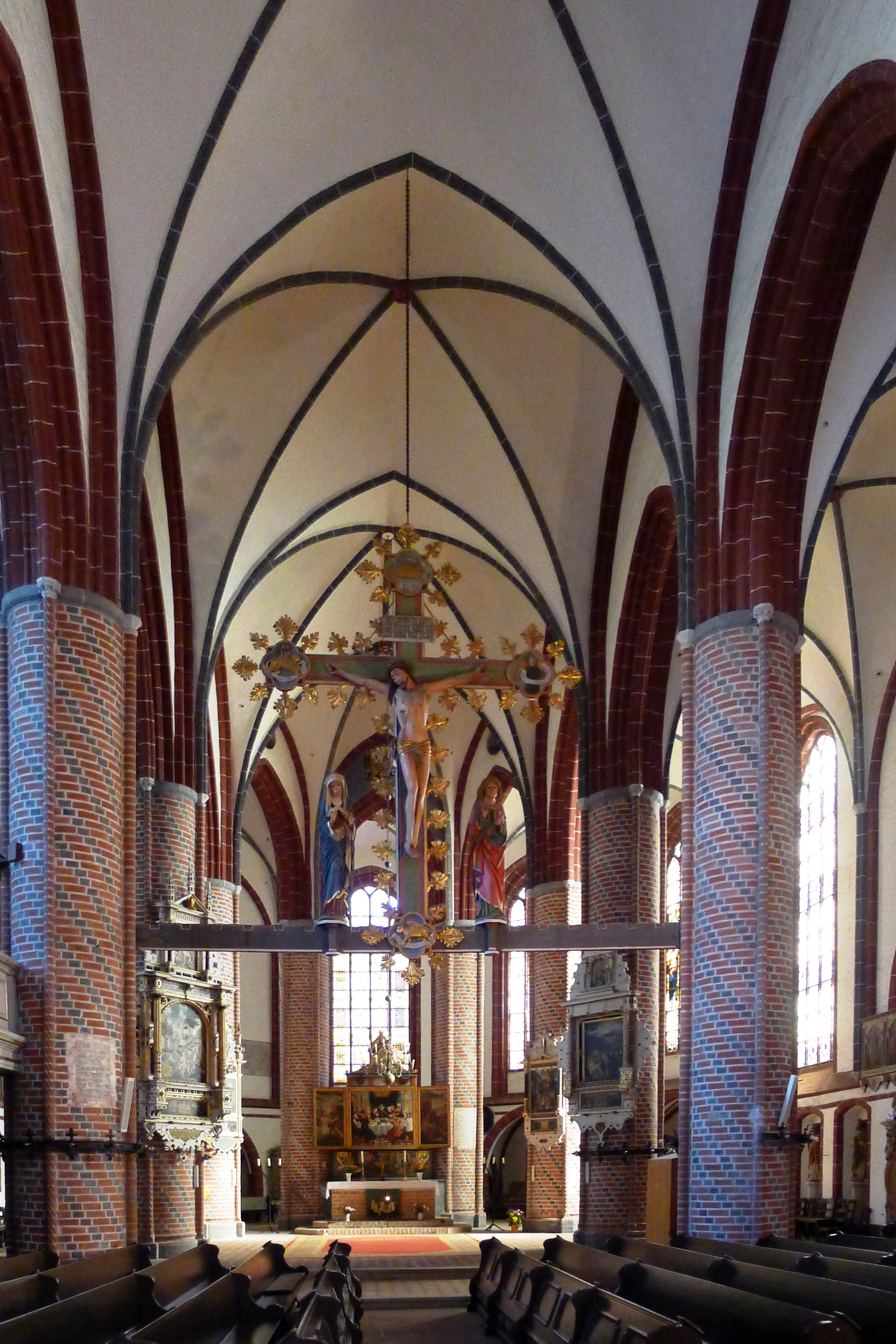 Blick in dasKirchenschiff in Richtung Altar